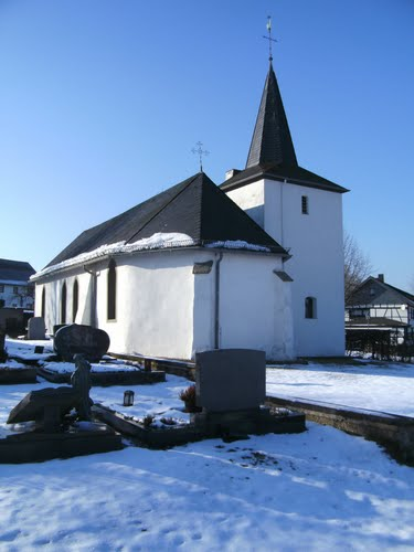 Kirche in Oberreifferscheid im Winter